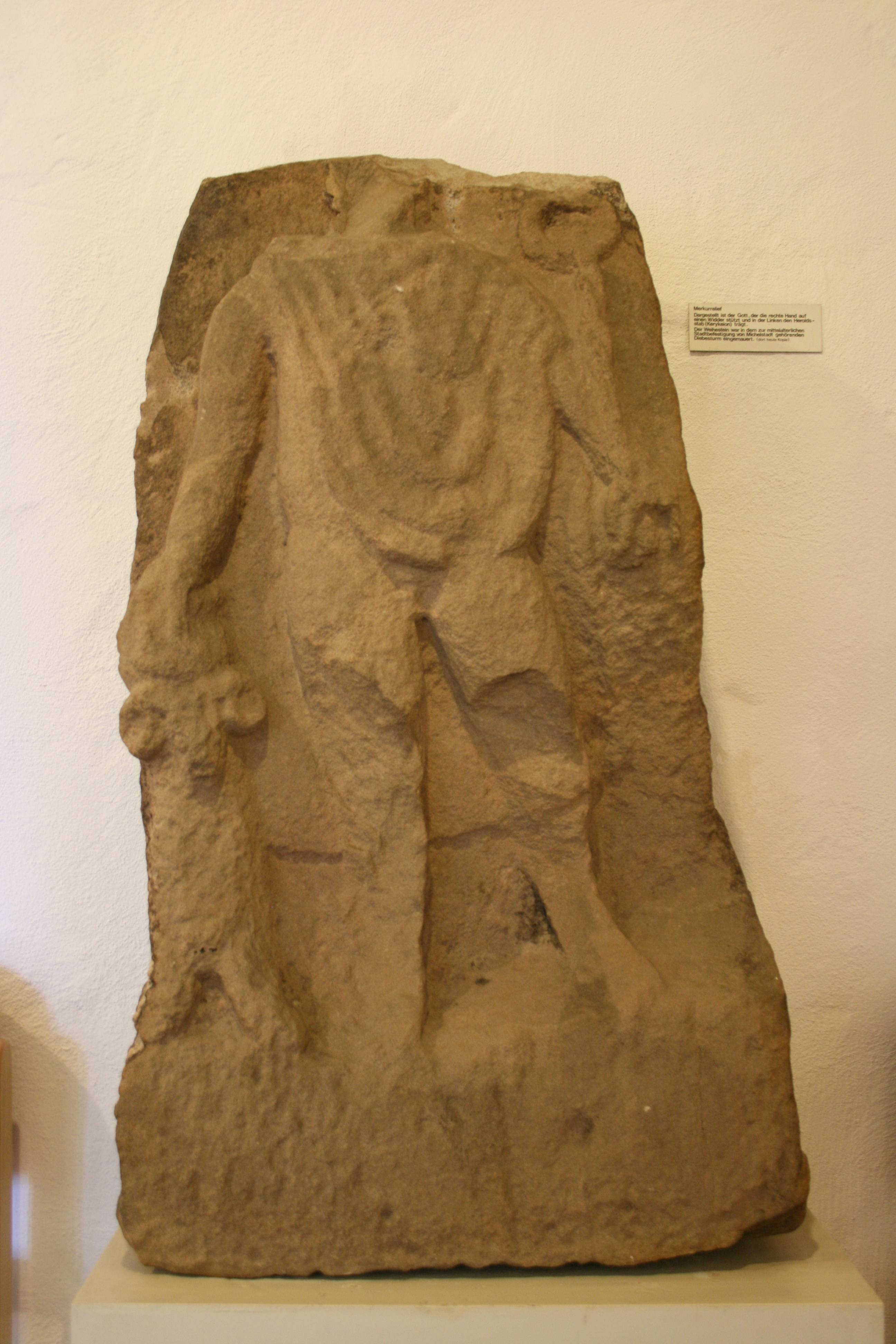 Merkurrelief aus dem Diebsturm in Michelstadt, Original im Odenwälder Heimat- und Spielzeugmuseum Michelstadt (am Turm selbst ist eine Kopie zu sehen).